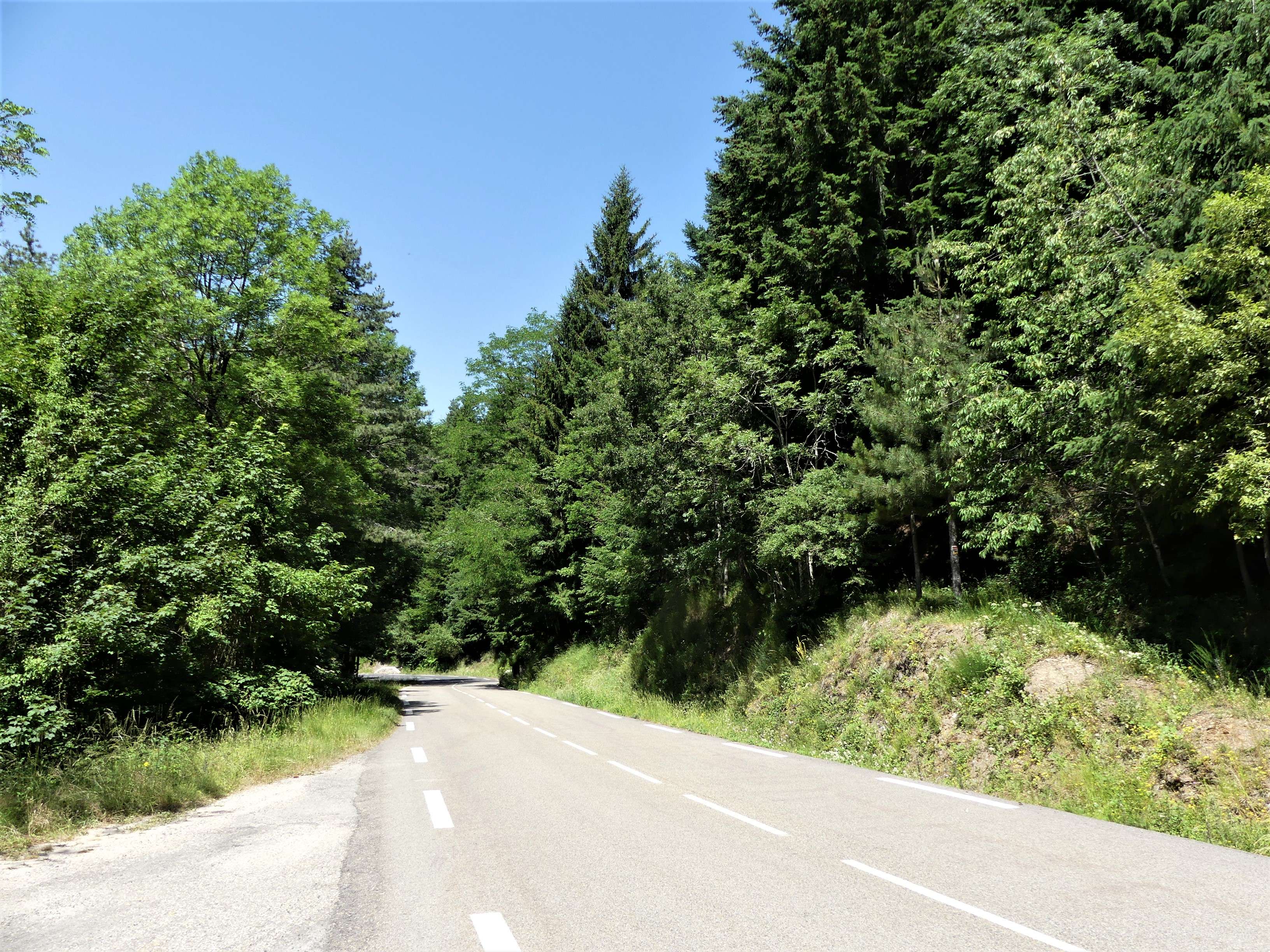 La route départementale 986, au Serre de Saint-Sauveur, Saint-Sauveur-Camprieu, Gard, France.